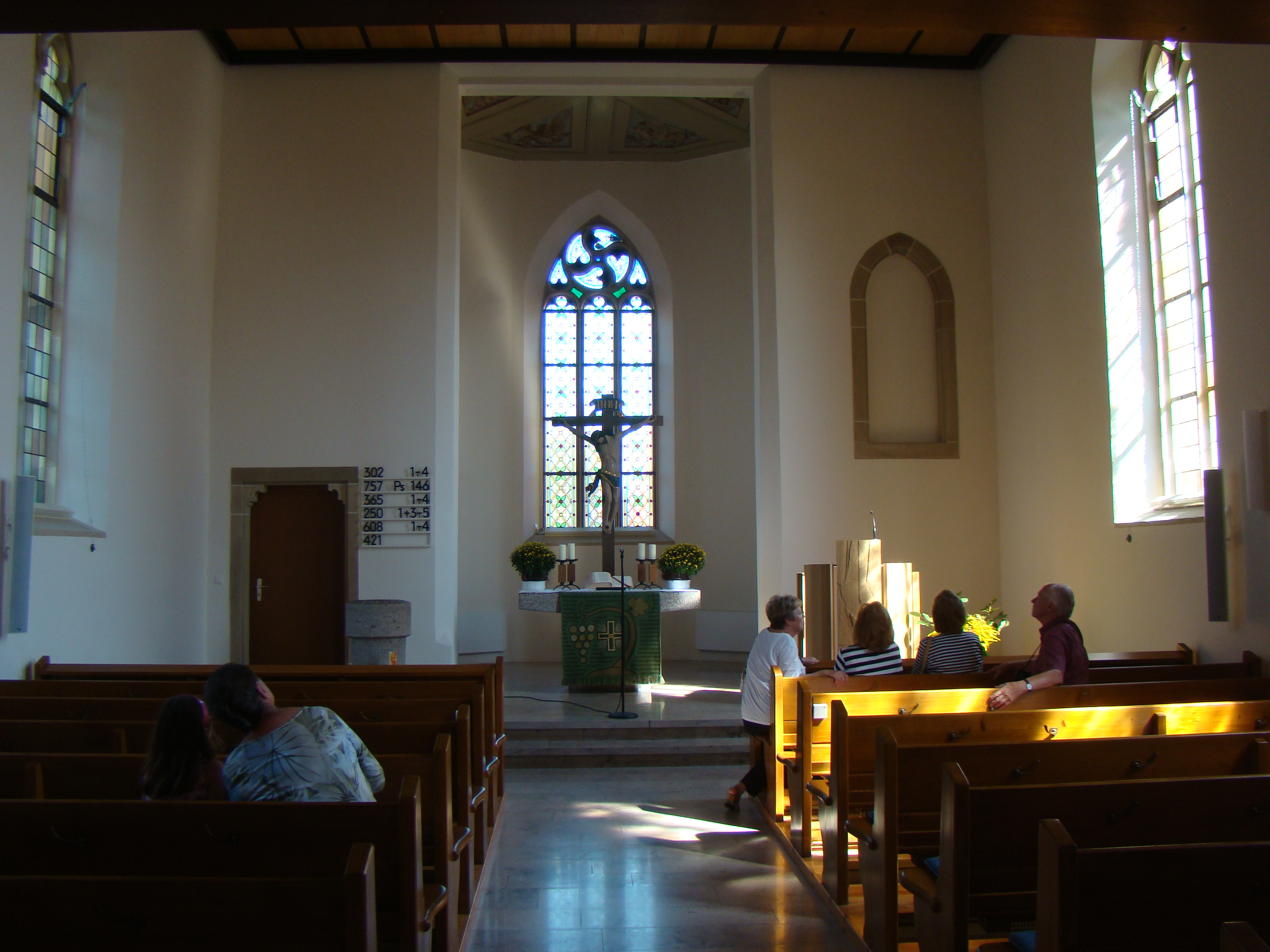 Albanskirche in Heilbronn-Frankenbach, Tag des offenen Denkmals 2012